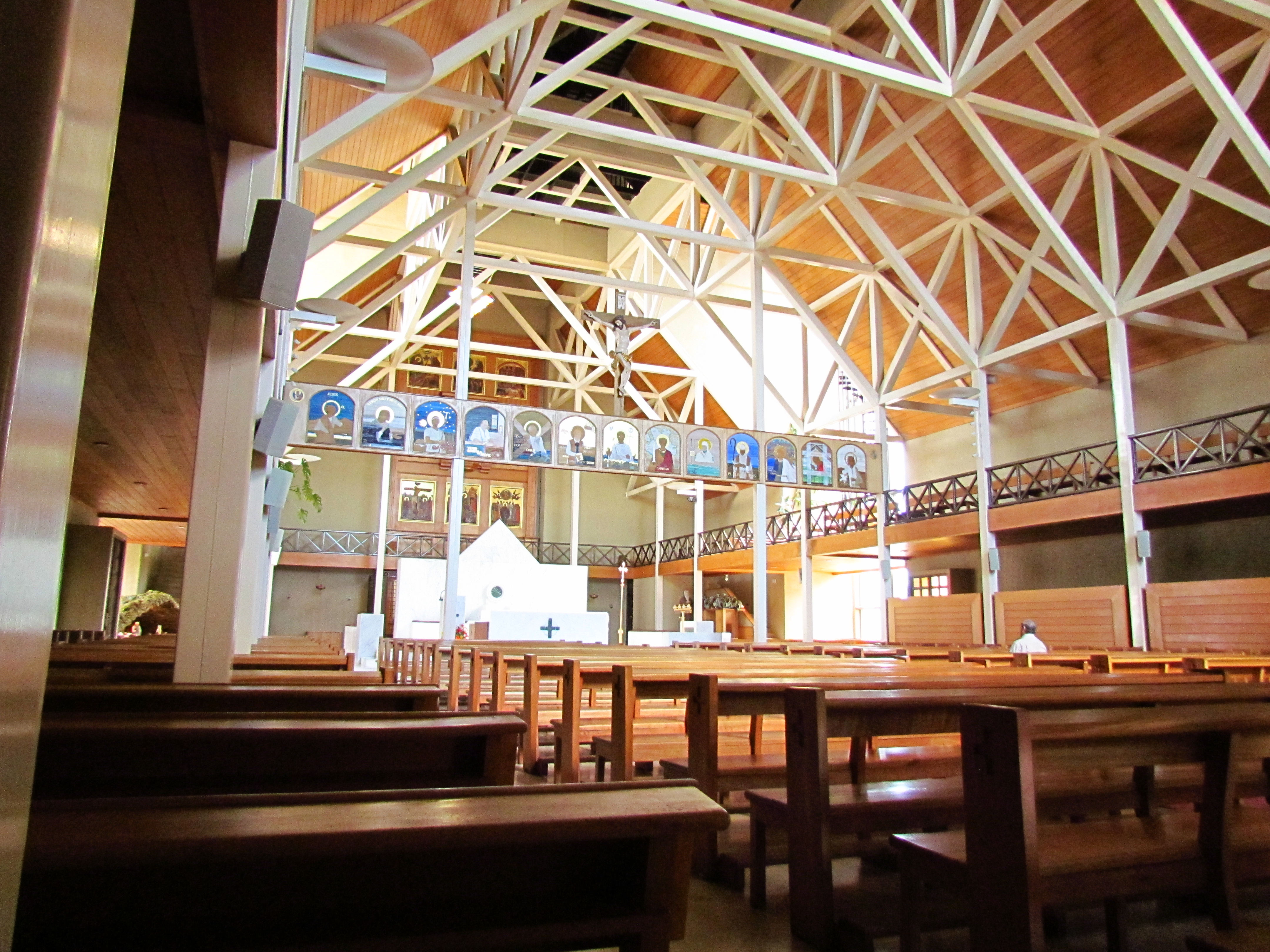 Vista interna de la Catedral de Valdivia